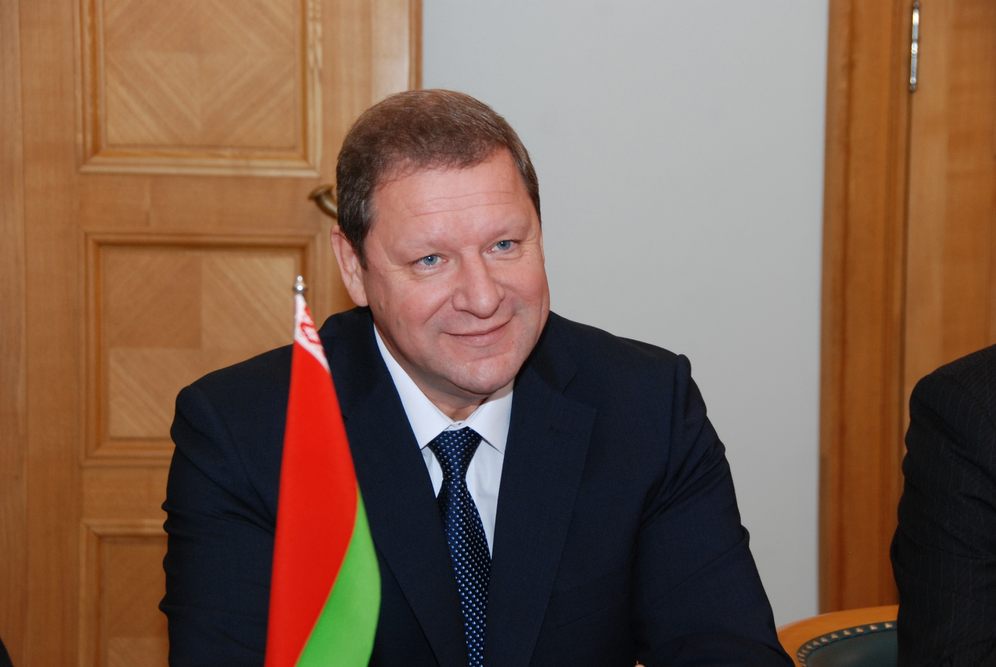 Ministru prezidenta Valda Dombrovska un Baltkrievijas premjerministra divpusējā tikšanās Foto: Aivis Freidenfelds, Valsts kanceleja